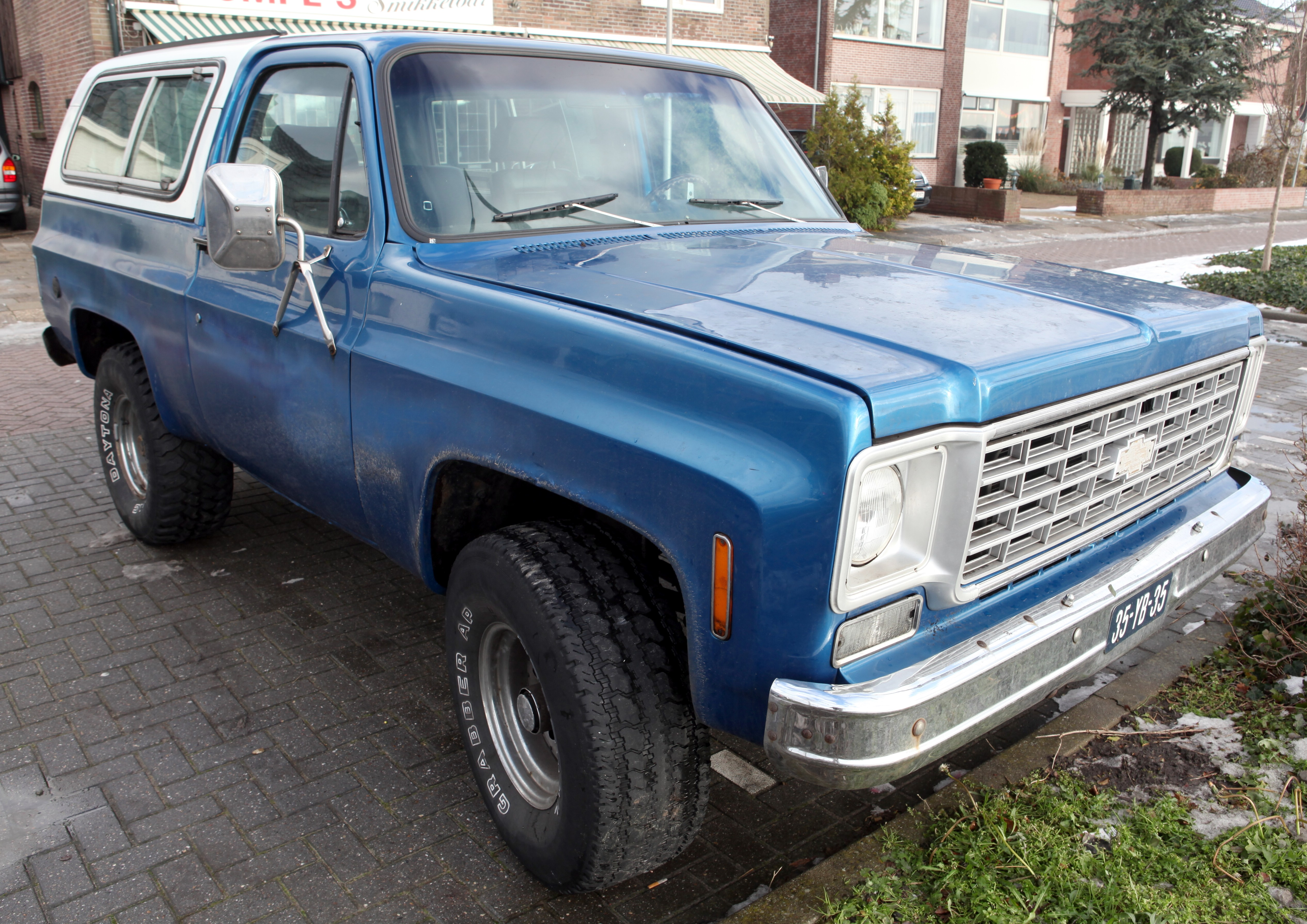 Chevrolet K 5 Blazer